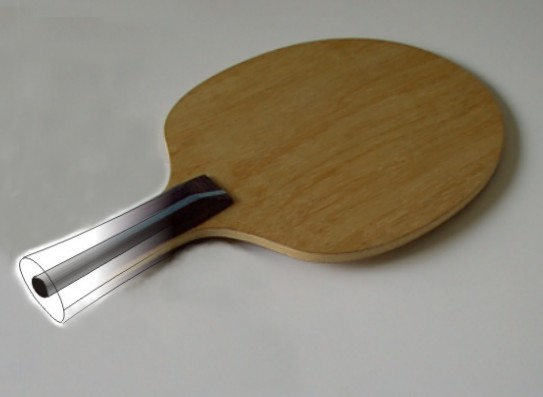 Tischtennis-Schläger mit Carbonrohr zur Schwingungsdämpfung